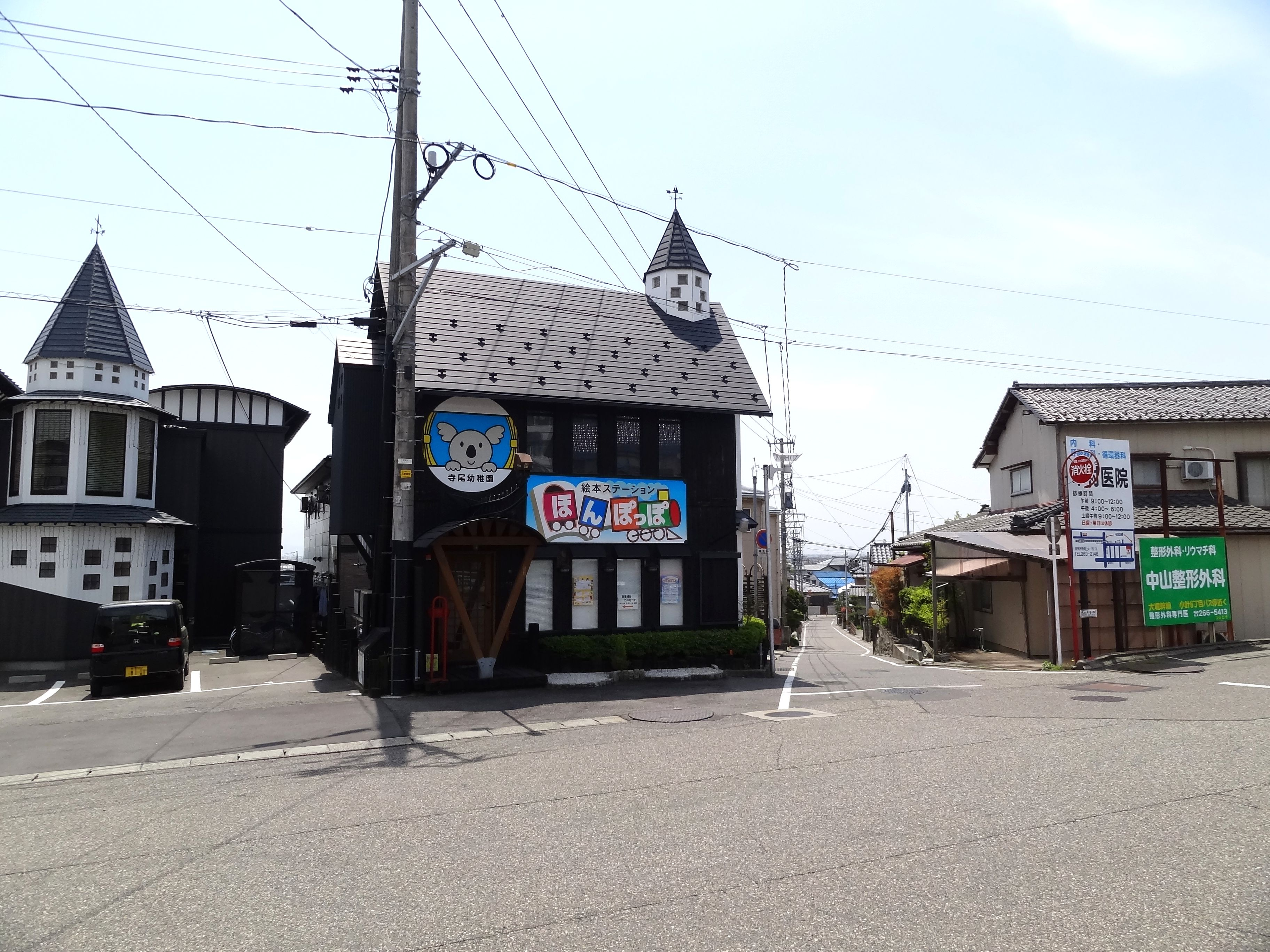 JR東日本越後線 寺尾駅前